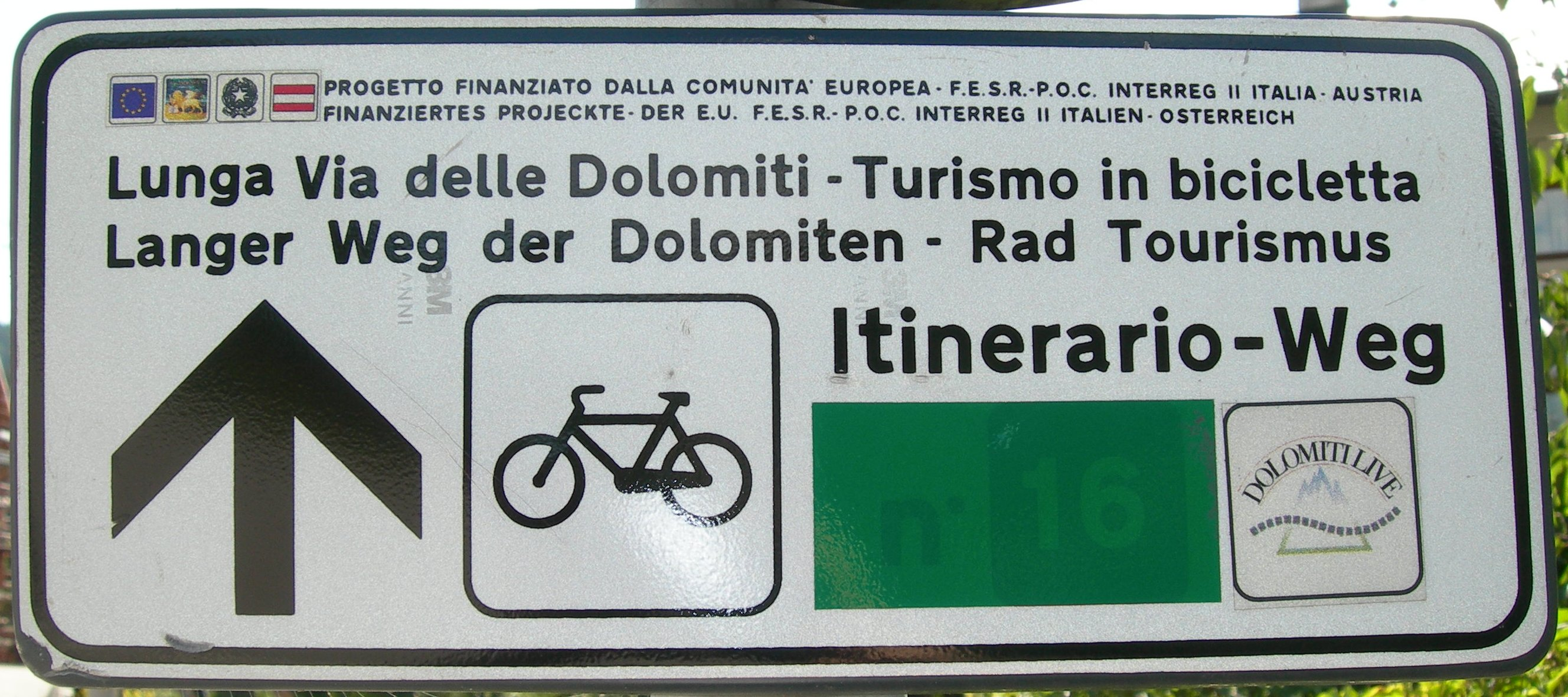 Cartello della Lunga Via delle Dolomiti nei pressi di Tai (frazione di Pieve di Cadore).